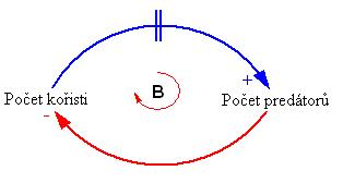 Diagram kauzalnich smycek se zdrzenim.